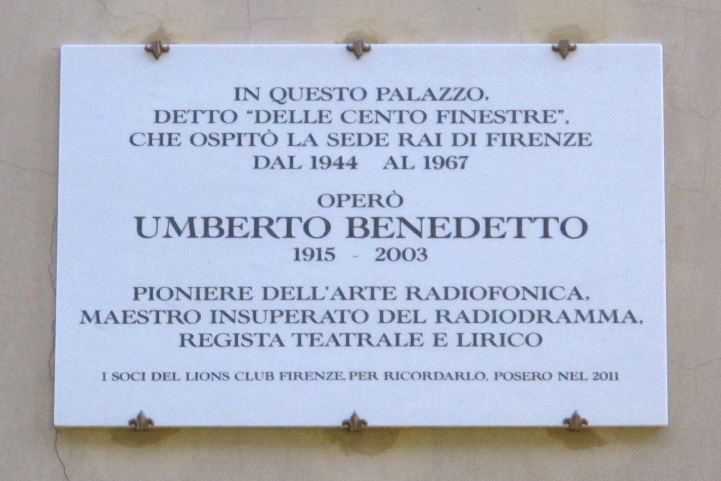 Palazzo delle cento finestre, targa umberto benedetto